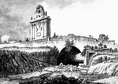 62 - PONTE DI SESSA VICINO A SANT'AGATA